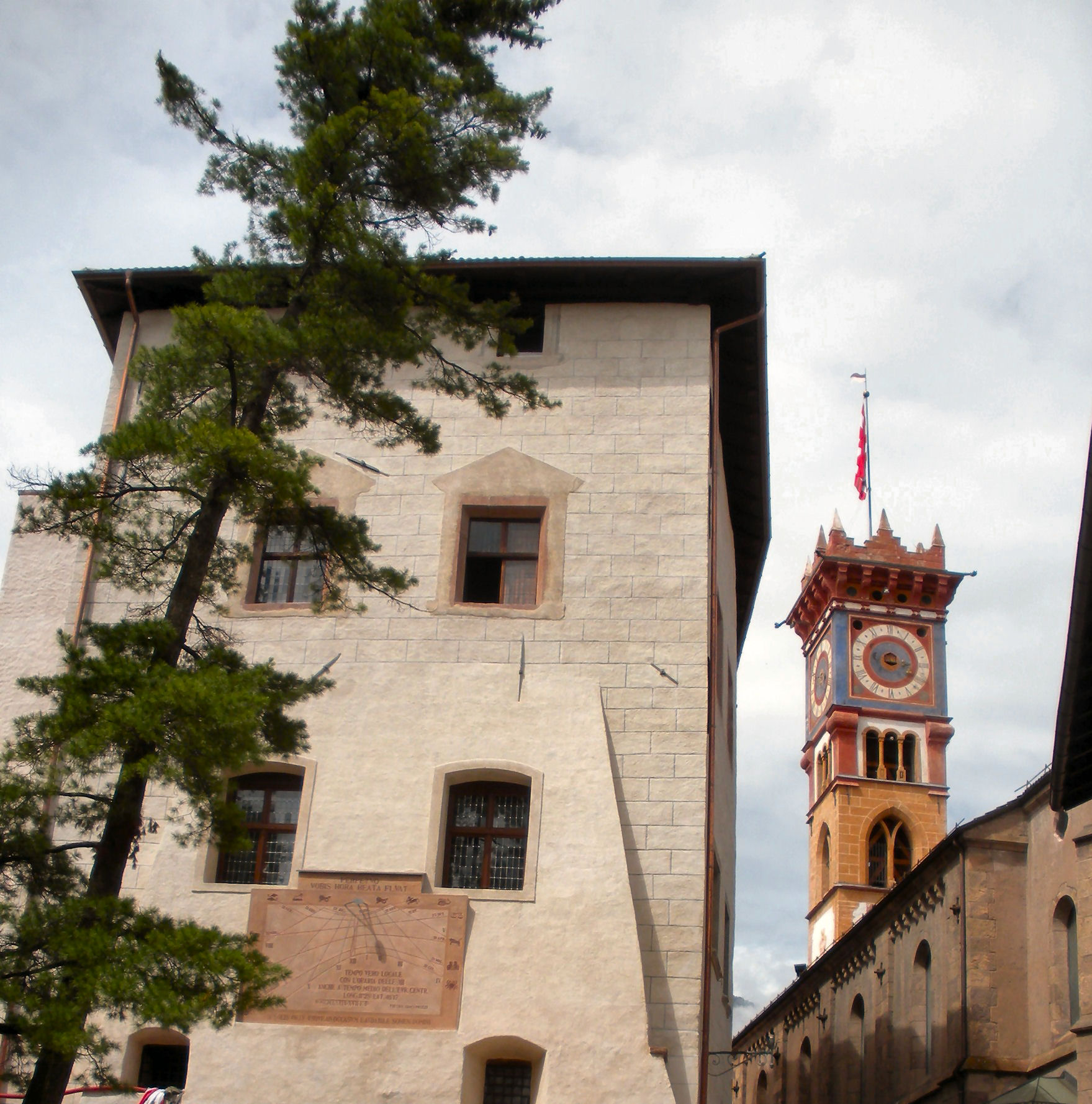 Cavalese (TN), la Torre Civica Foto propria Luglio 2009